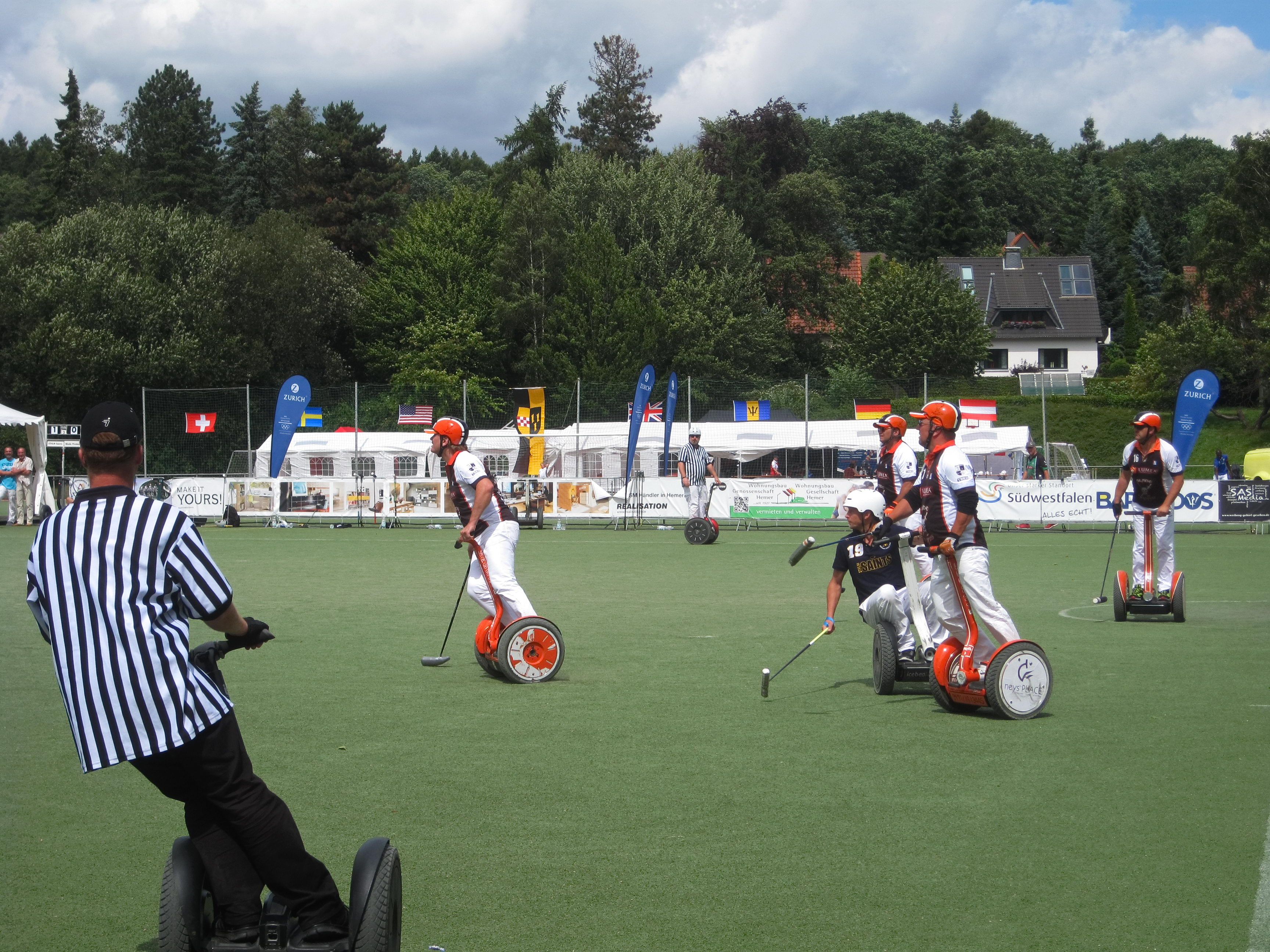 Segwaypolo-Weltmeisterschaft 2017 in Hemer: Spiel um den dritten und vierten Platz zwischen Stockholm Saints und Blade Pirates